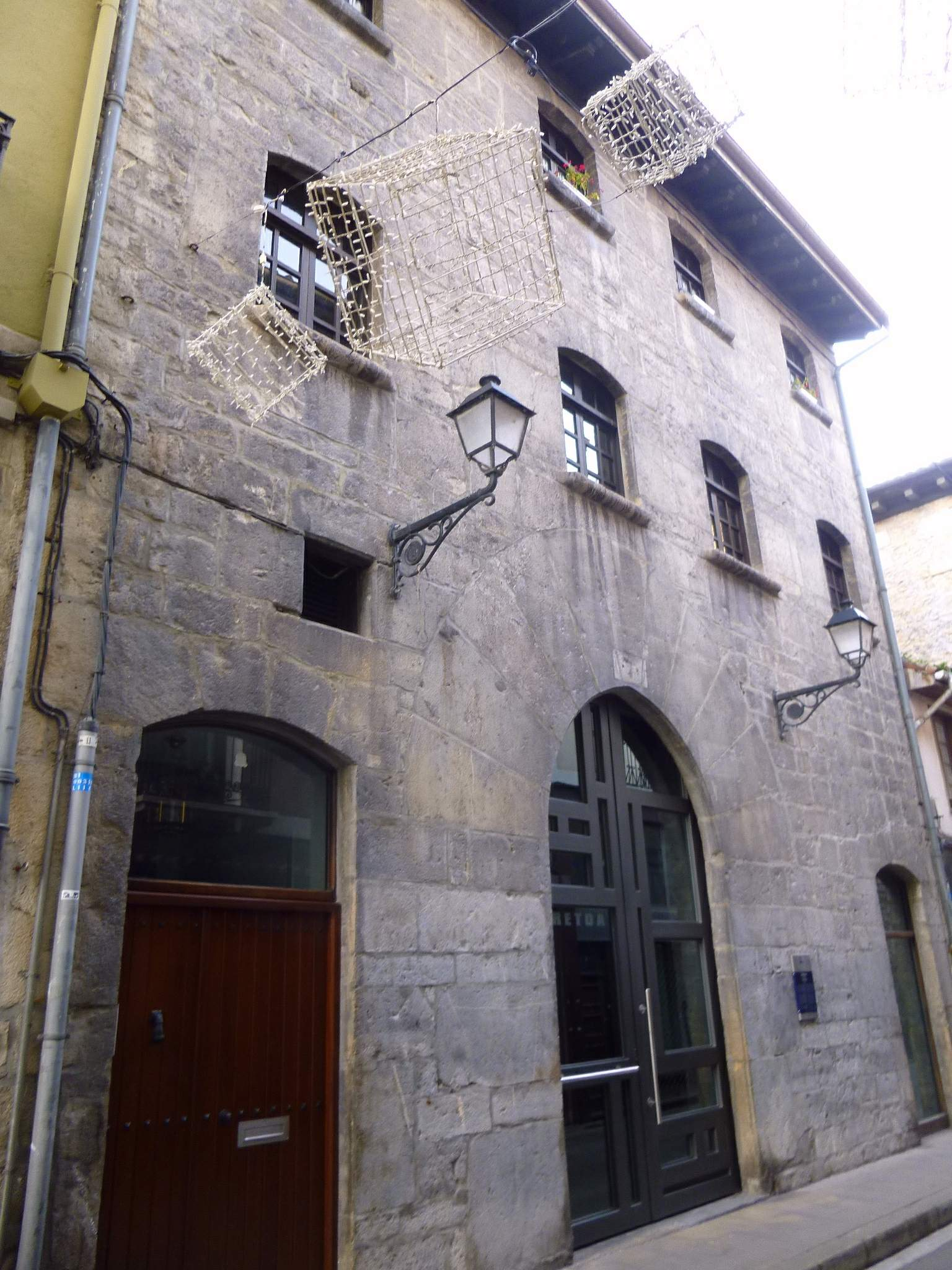 Aroztegi jauregia (Bergara, Gipuzkoa)